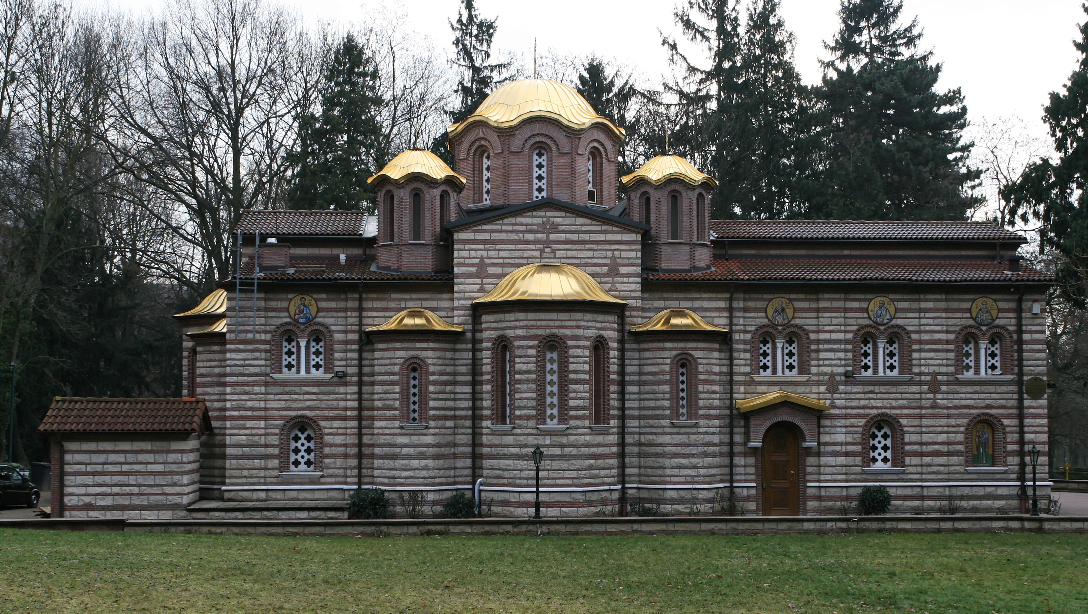 Georgioskirche in Frankfurt am Main-Westend, Sebastian-Rinz-Straße 2a